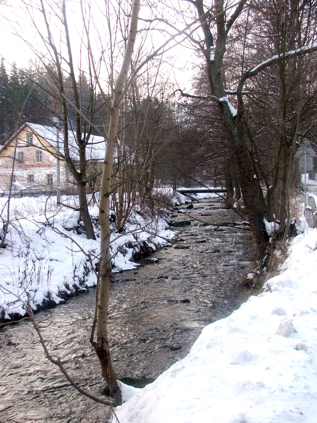 Krupá, levý přítok Moravy, Staré Město (okres Šumperk)